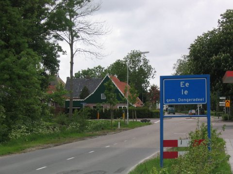 Foto gemaakt door Hans Bevers op verzoek van Philip Bosma en beschikbaar gesteld voor gebruik op internet: 31-5-2006 12:15 "Hallo Philip, Mijn mailtje was ontdaan van tekst, omdat een eerdere versie vanuit Picasa niet verzonden kon worden. Je mag met de foto’s doen wat je wilt". categorie:afbeelding plaatsnaambord